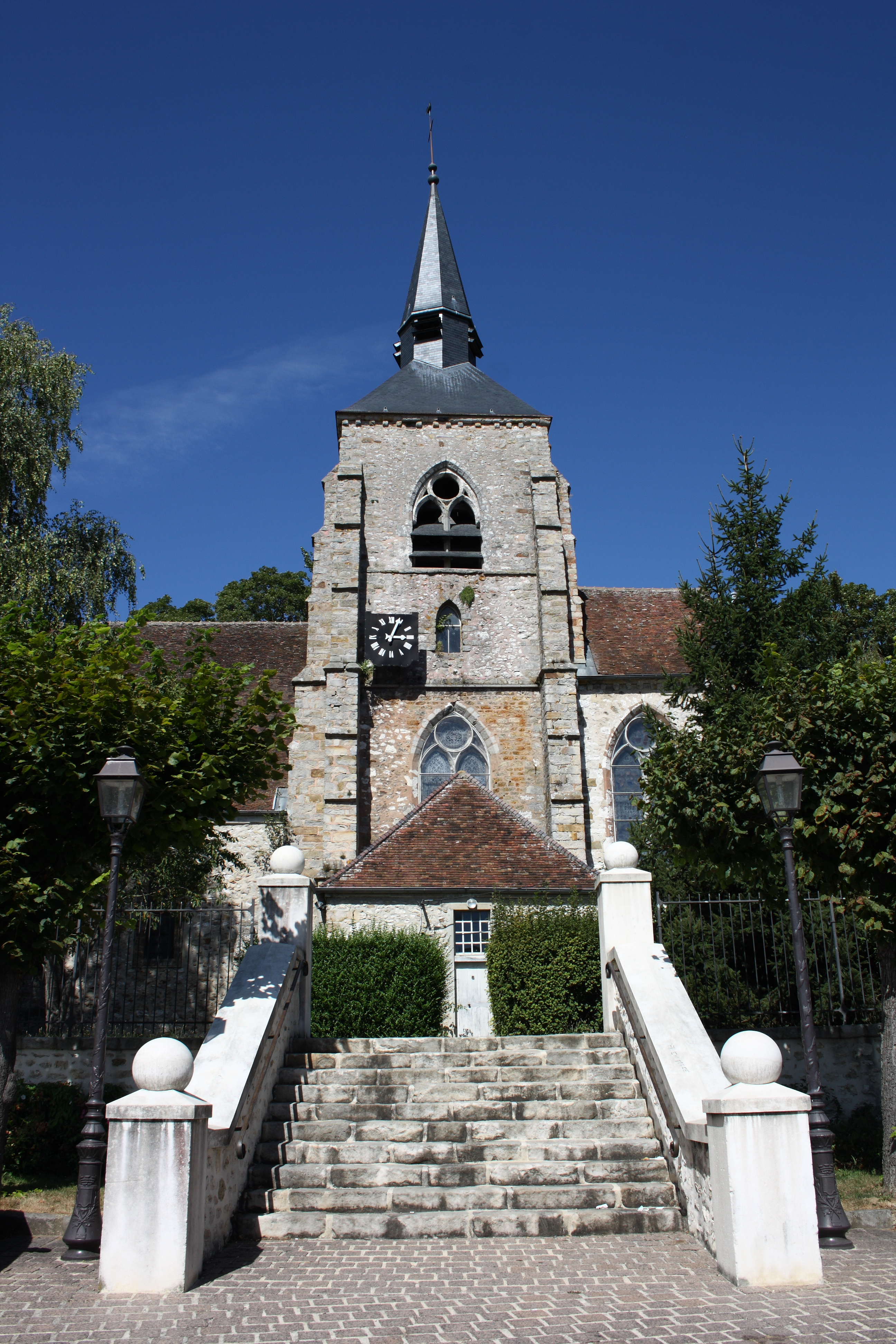 Kirche Saint-Pierre-Saint-Paul in Jouy-sur-Morin im Département Seine-et-Marne (Île-de-France)